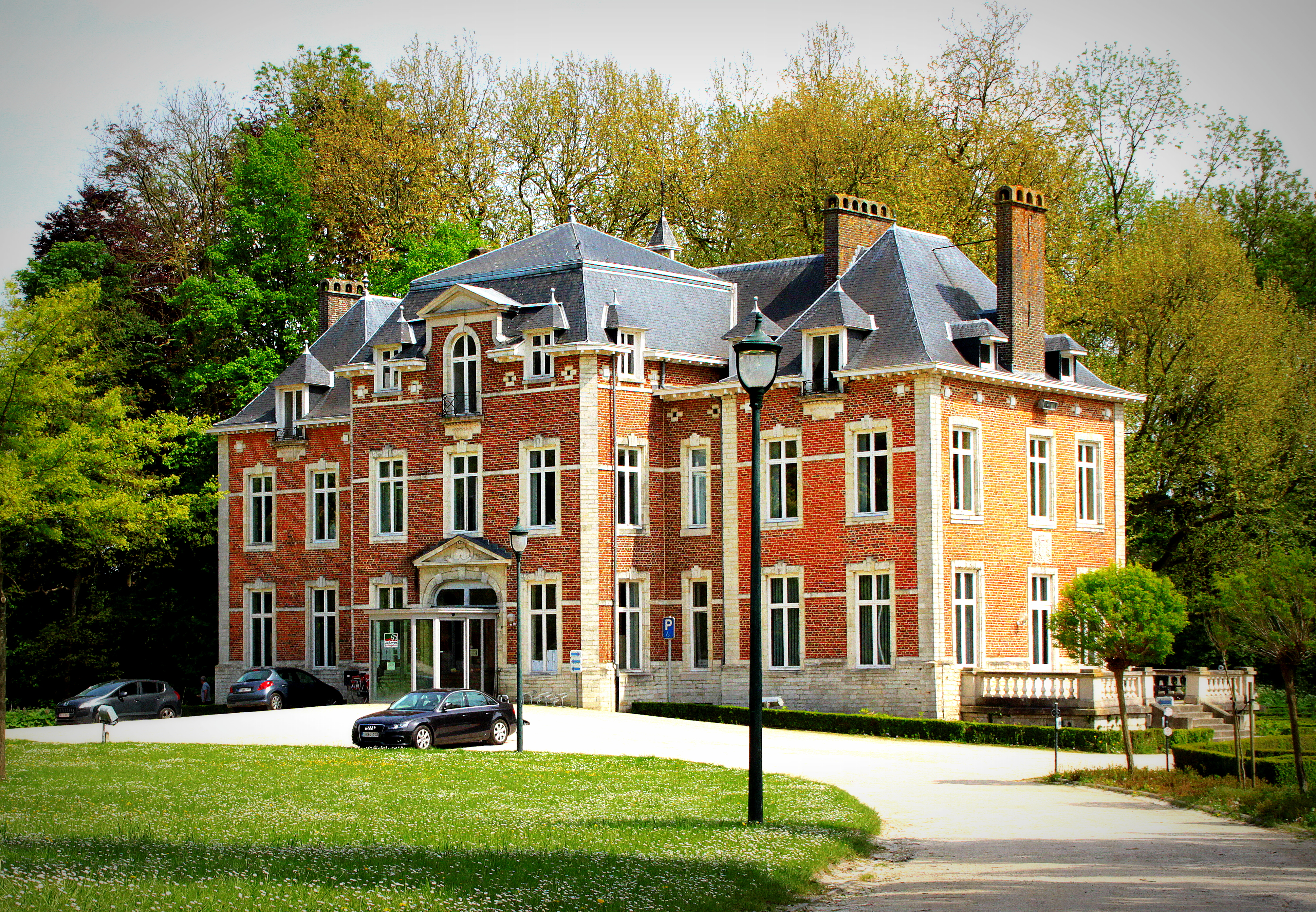 D'Schlass vu Kwabeek (2015)